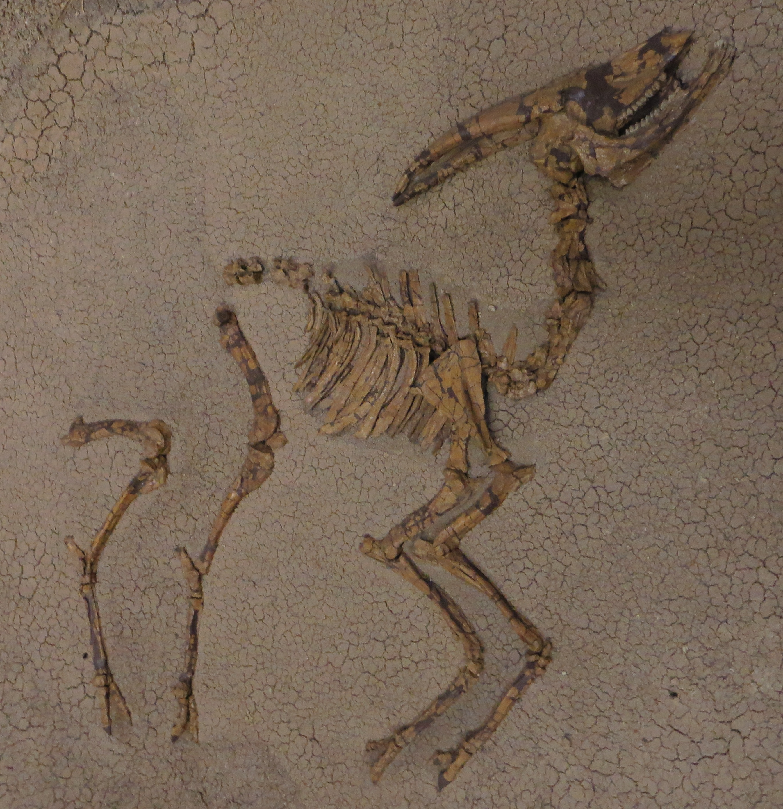 Fossil - Took the picture at Natural History Museum, Karlsruhe